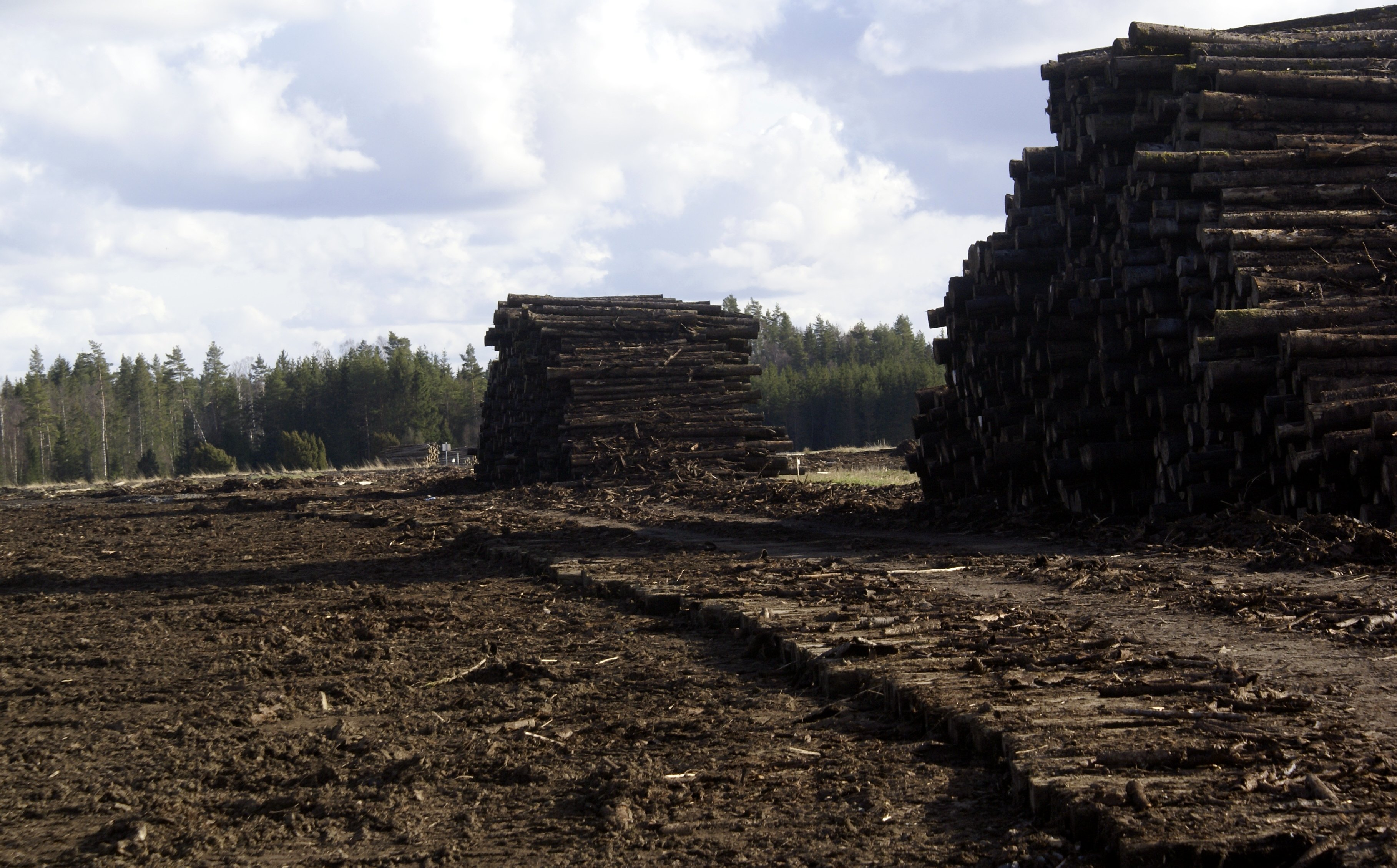 Woodpile from Orkanen Gudrun